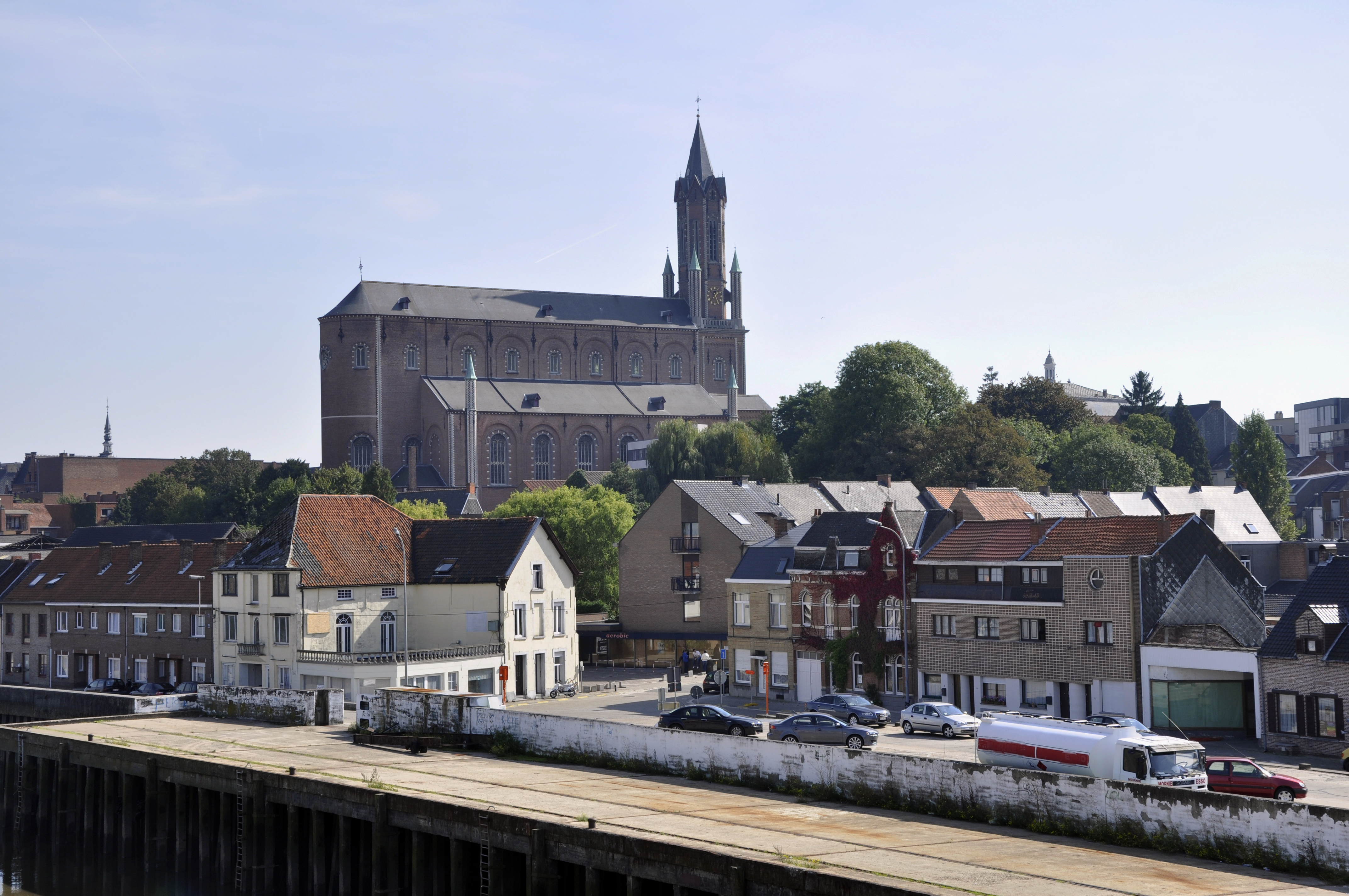 Sint-Gertrudiskerk te Wetteren, België